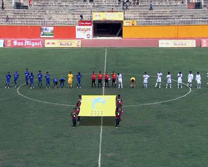 नेपाली: दसरथ रंगशाला